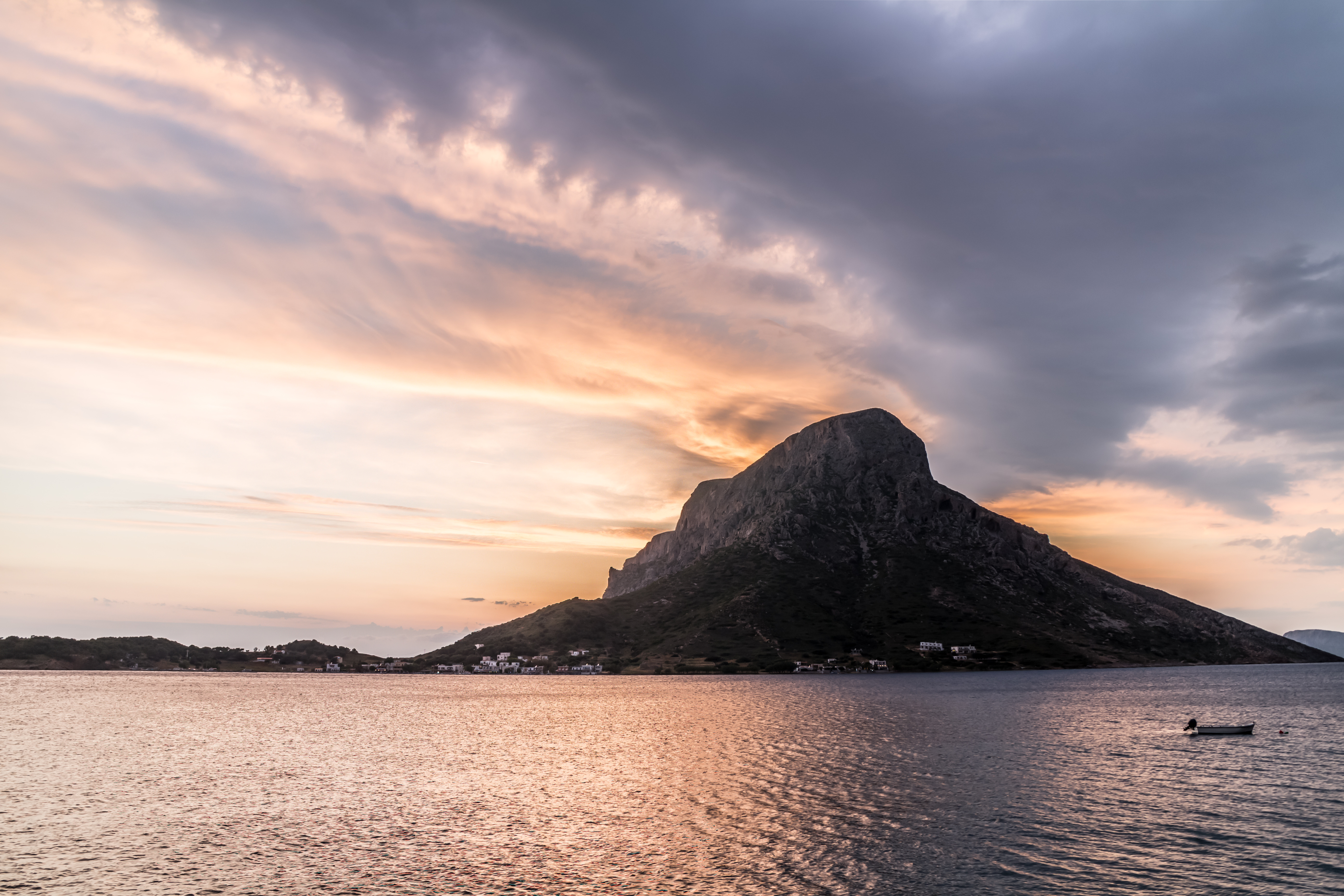 Insel Telendos, von der Insel Kalymnos aus fotografiert.